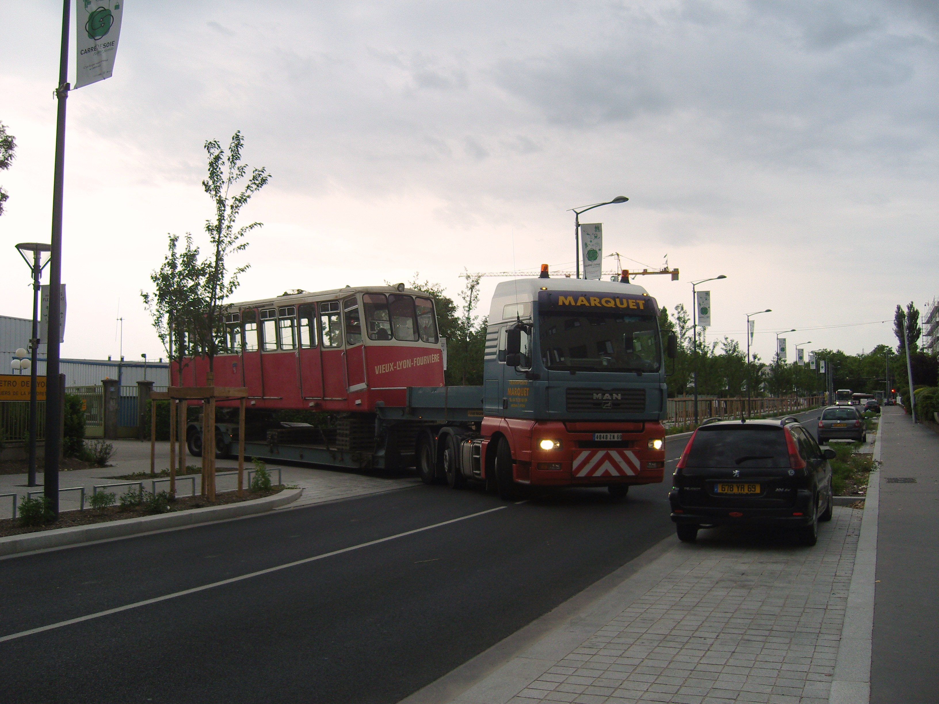 En 2009, le Funiculaire Fourvière a subi la maintenance décennale, entrainant une interruption temporaire de la ligne. La continuité du service a été assurée par des bus relais entre Vieux Lyon et Fourvière.